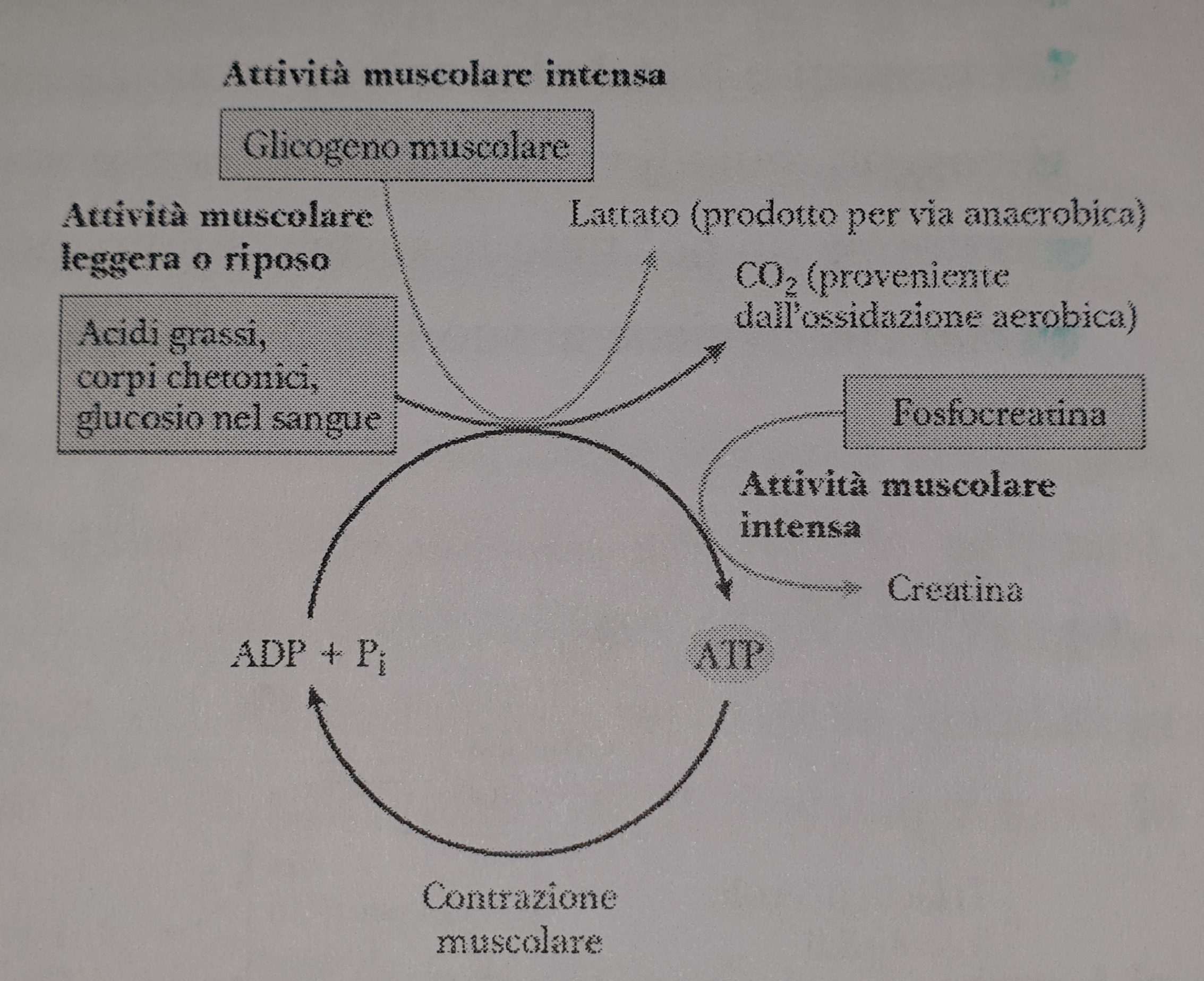 Utilizzo della fosfocreatina nella contrazione muscolare intensa per ottenere ATP di uso immediato